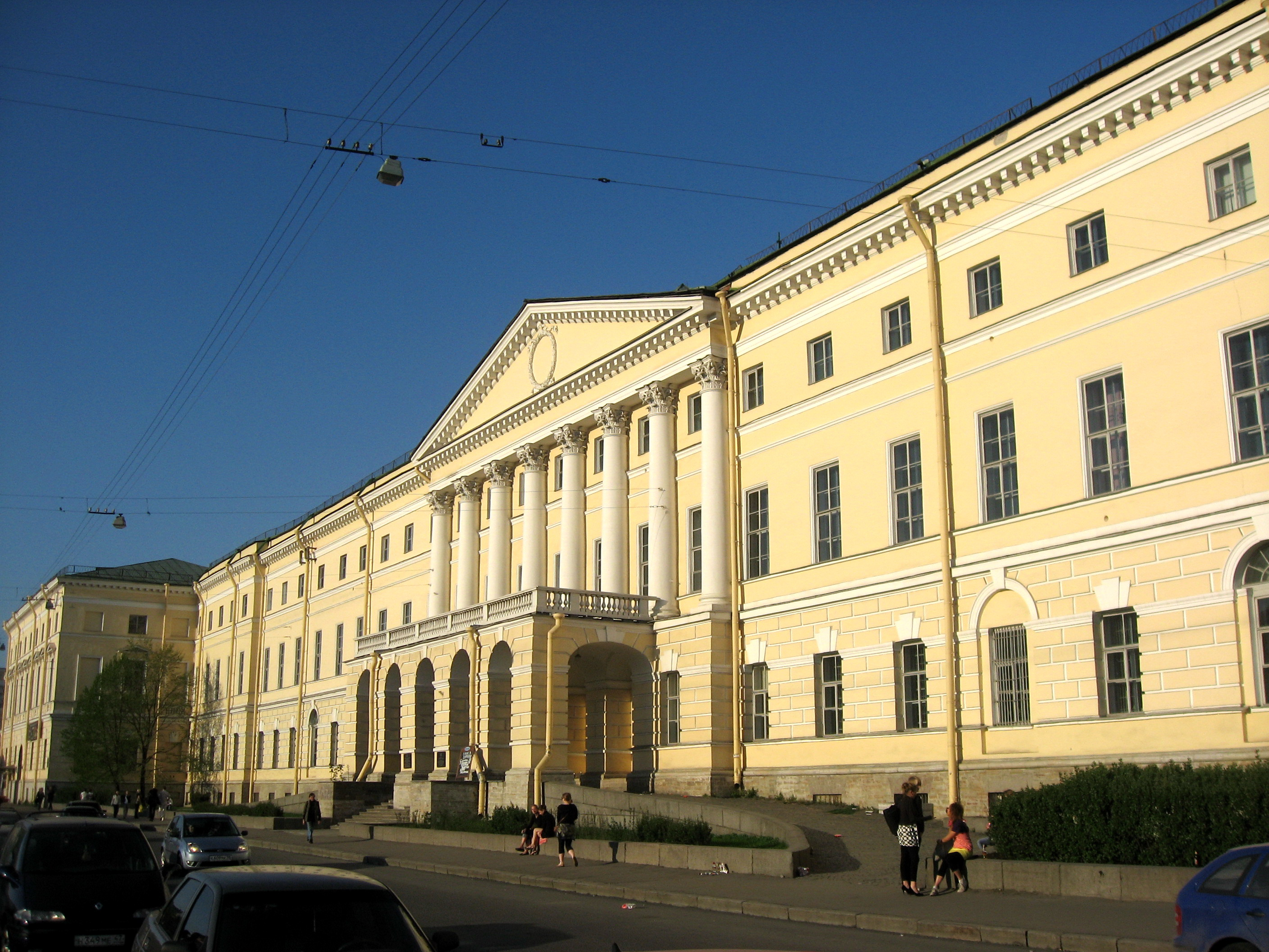 Sankt-Petěrburg